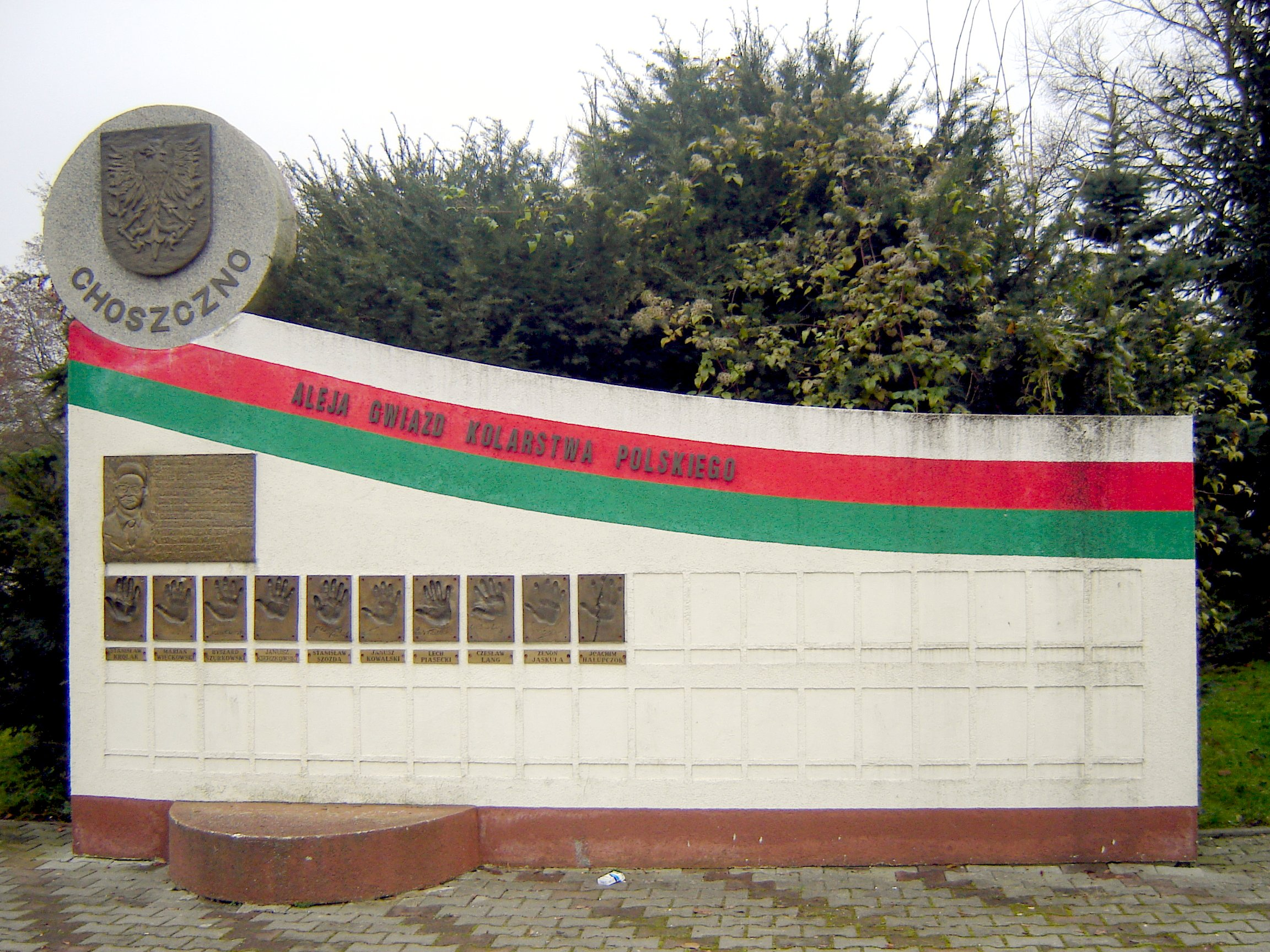 Aleja Gwiazd Kolarstwa Polskiego w Choszcznie- została otwarta w czerwcu 2002. Pomnik odsłonięto przy okazji XXVIII ogólnopolskiego kryterium kolarskiego o memoriał red. Zygmunta Weissa. Znalazły się na niej odciski dłoni wielu sławnych i uznanych kolarzy m.in. Ryszarda Szurkowskiego, Stanisława Szozdy, Janusza Kowalskiego, Lecha Piaseckiego, Czesława Langa i Zenona Jaskuły oraz symboliczna tablica z pękniętą dłonią nieżyjącego już Joachima Halupczoka. Nad całością widnieje tablica poświęcona patronowi kolarskiego memoriału, red. Zygmuntowi Weissowi.